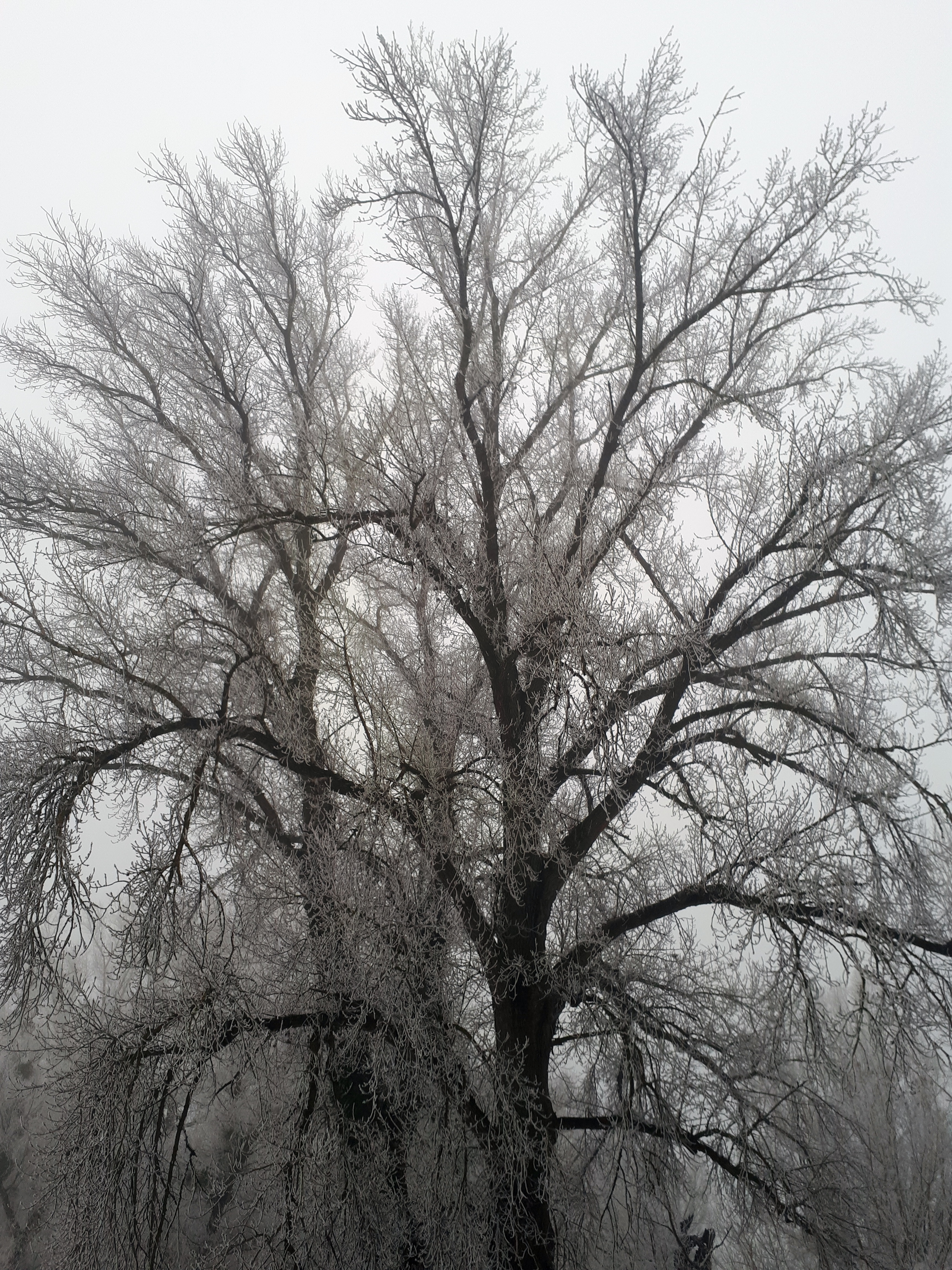 Стабло црне тополе прекривено ињем